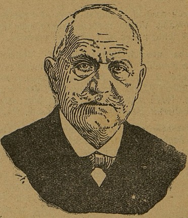 Matúš Dula - slovenský politik